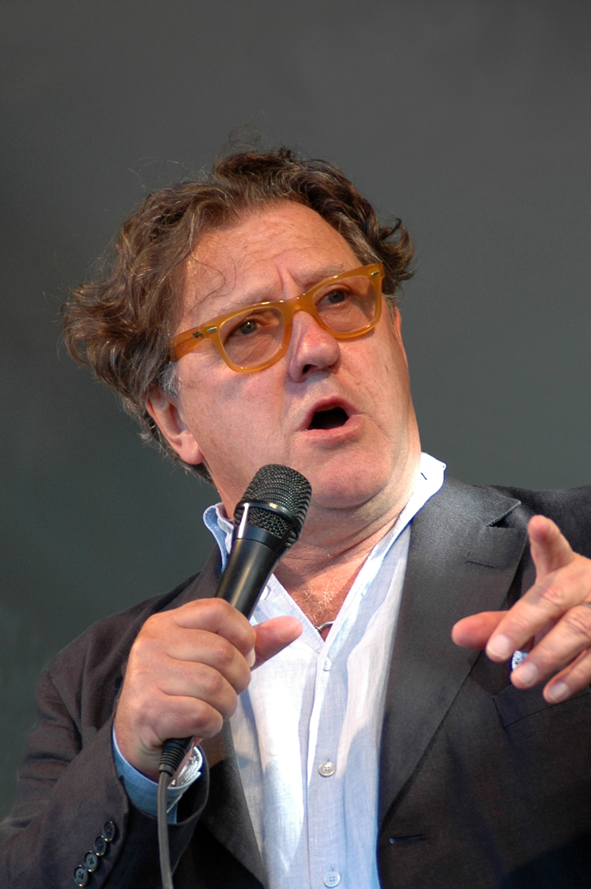 Tommy Körberg på Cornelisdagen stockholm 2 augusti 2009.